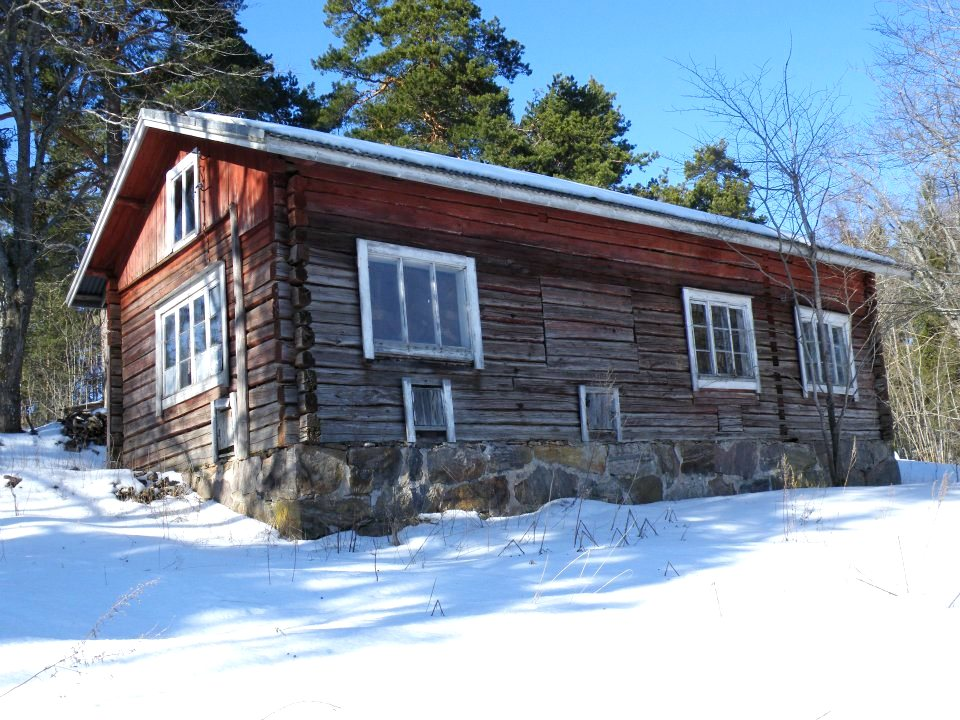 Vanha hirsirakennus, Lielahden saari, Parainen